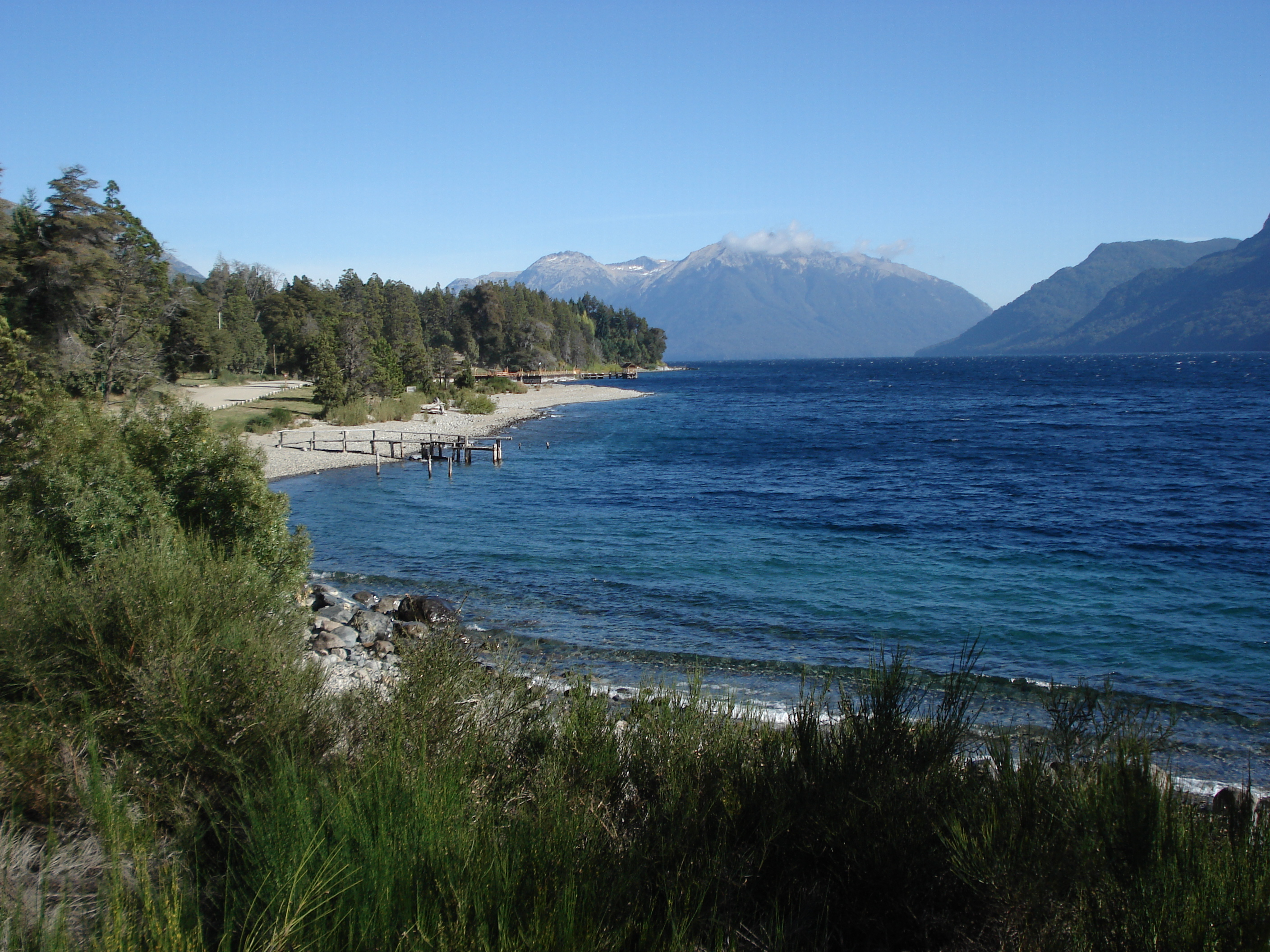 Lago Traful - Villa Traful Neuquen Argentina